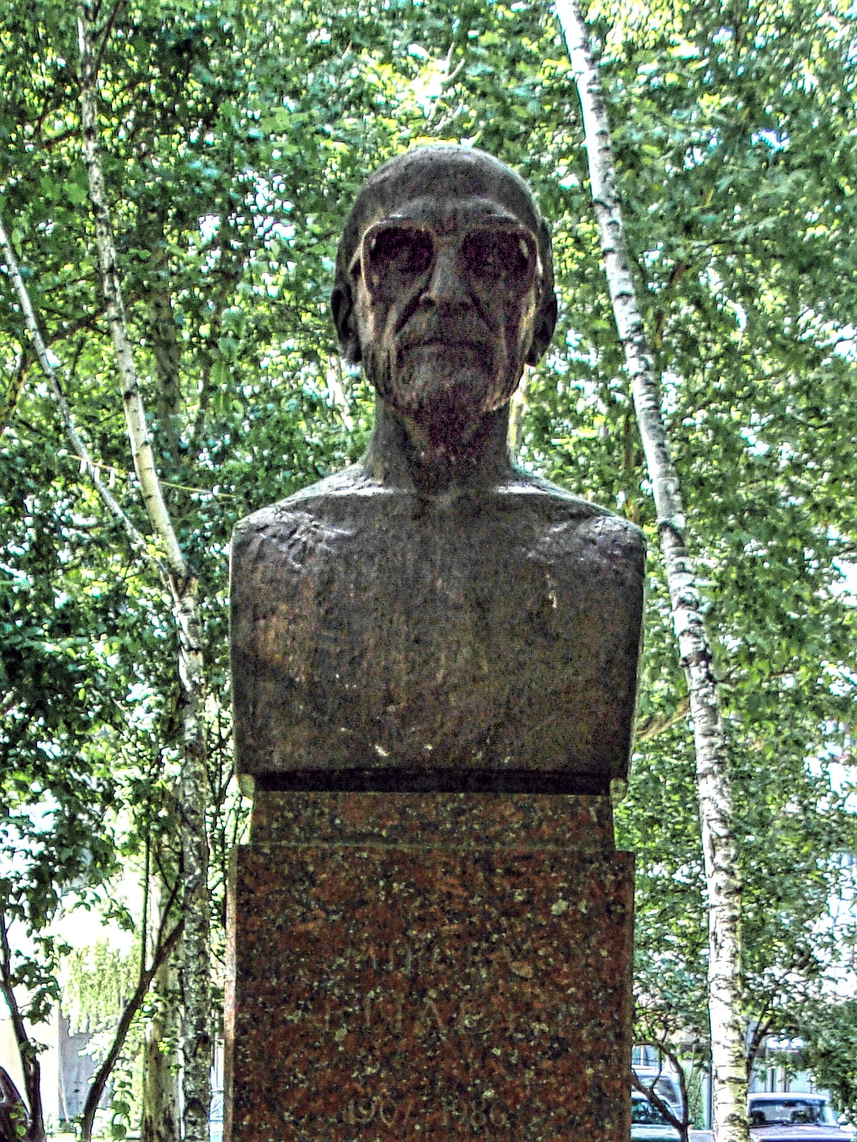 Бюст Мирчи Элиаде на Аллее Классиков в Кишиневе